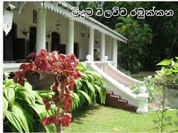 සිංහල: මීදුම වලව්ව